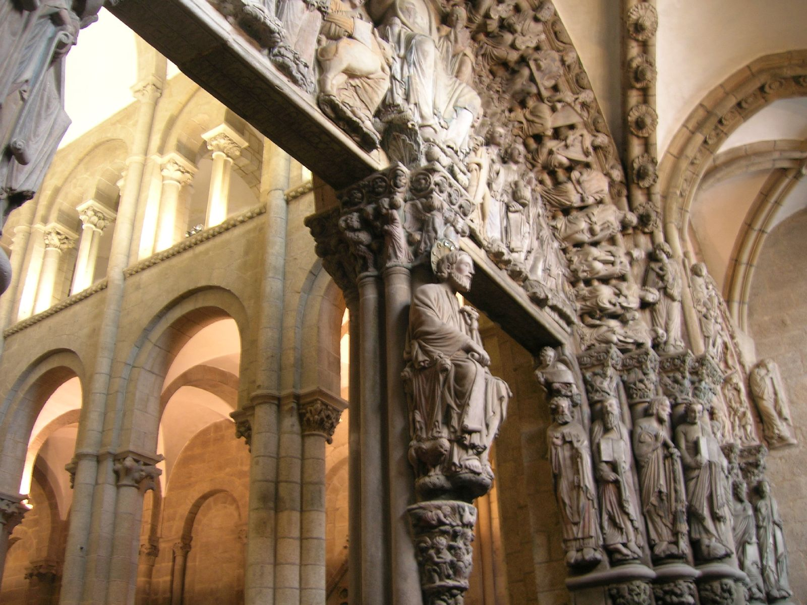 Joya del arte románico y obra del Maestro Mateo, arquitecto de Fernando II de León, que supo plasmar en piedra un denso mensaje teológico.